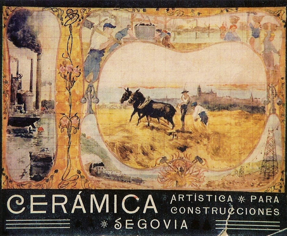 Portada de un catálogo de Daniel Zuloaga destinado a constructores (1904)